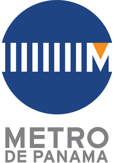 Logo del Metro de Panamá